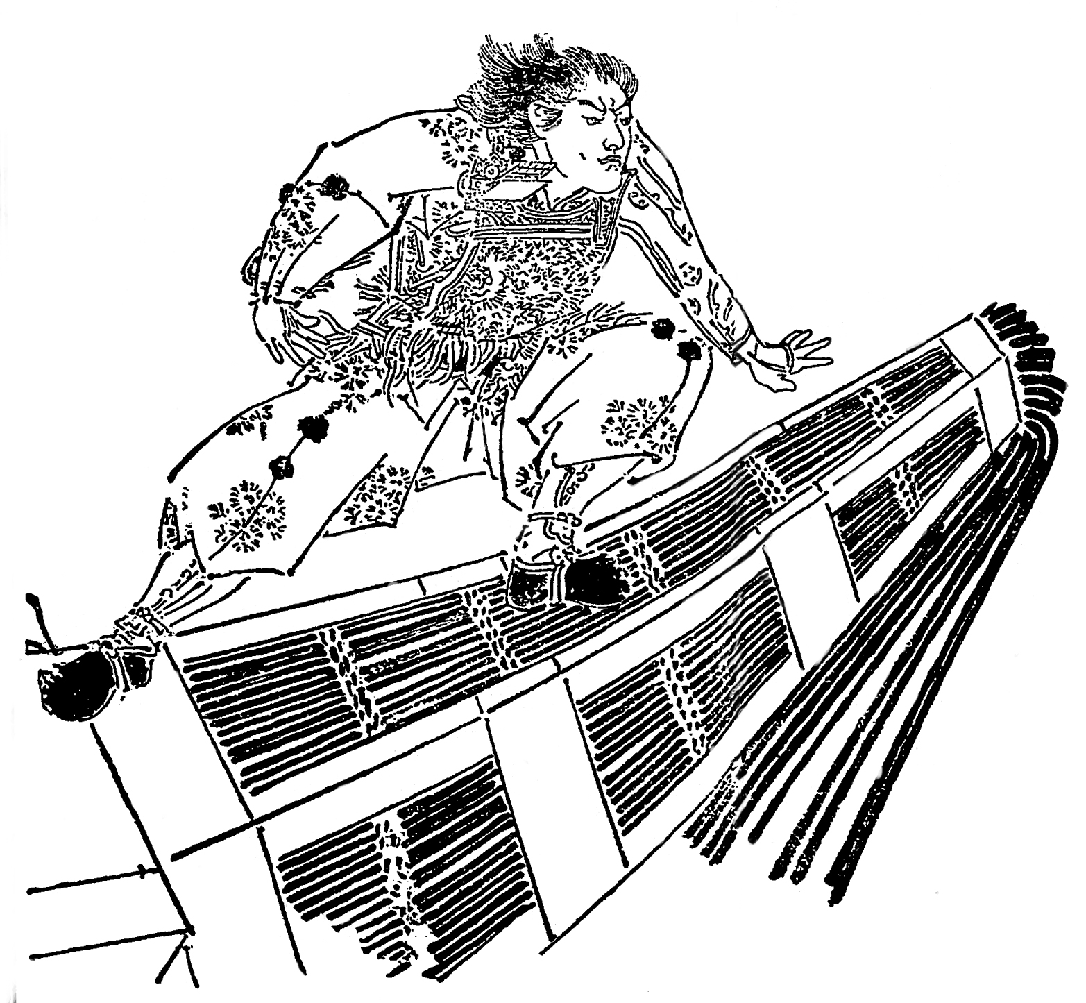 平教経。平安時代末期の武将。／江戸時代『前賢故実』より。画：菊池容斎